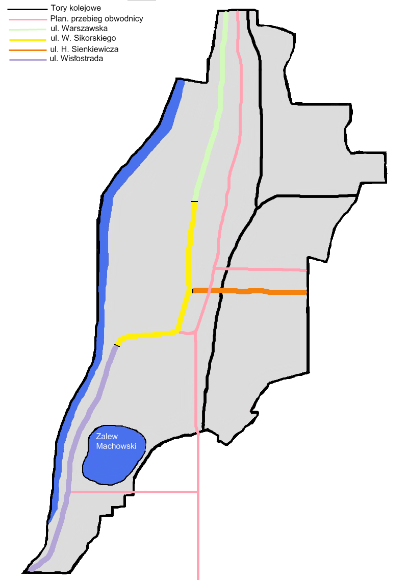 mapa Tarnobrzega